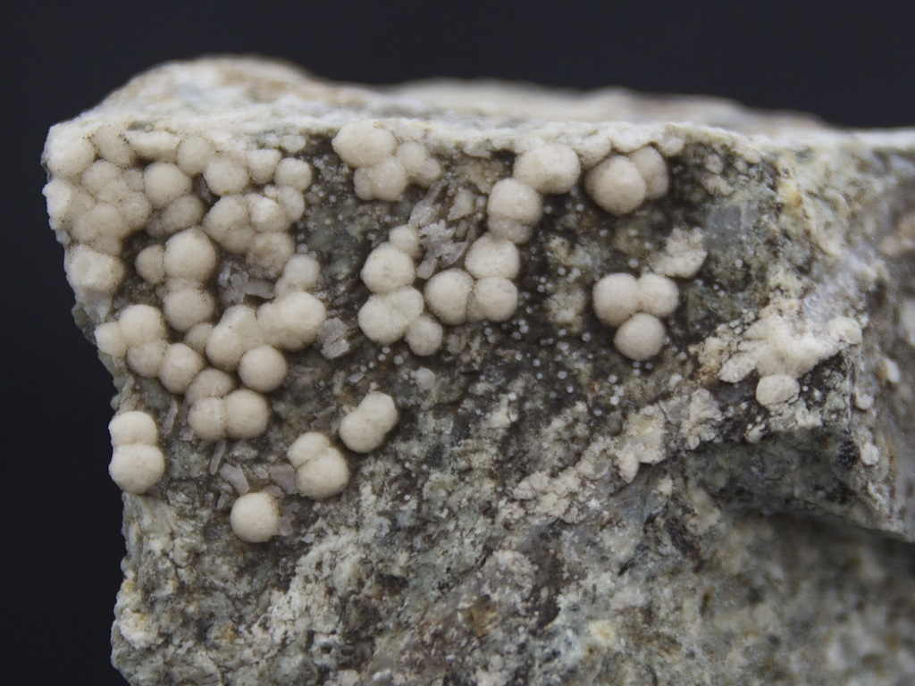 Fluorita globular blanca de Can Franquesa, Santa Coloma de Gramenet (Barcelona). Col·lecció Joan Garcia. Mides: 5.5 x 4.8 x 3 cm. Data de recol·lecció: 8 de juny de 2013